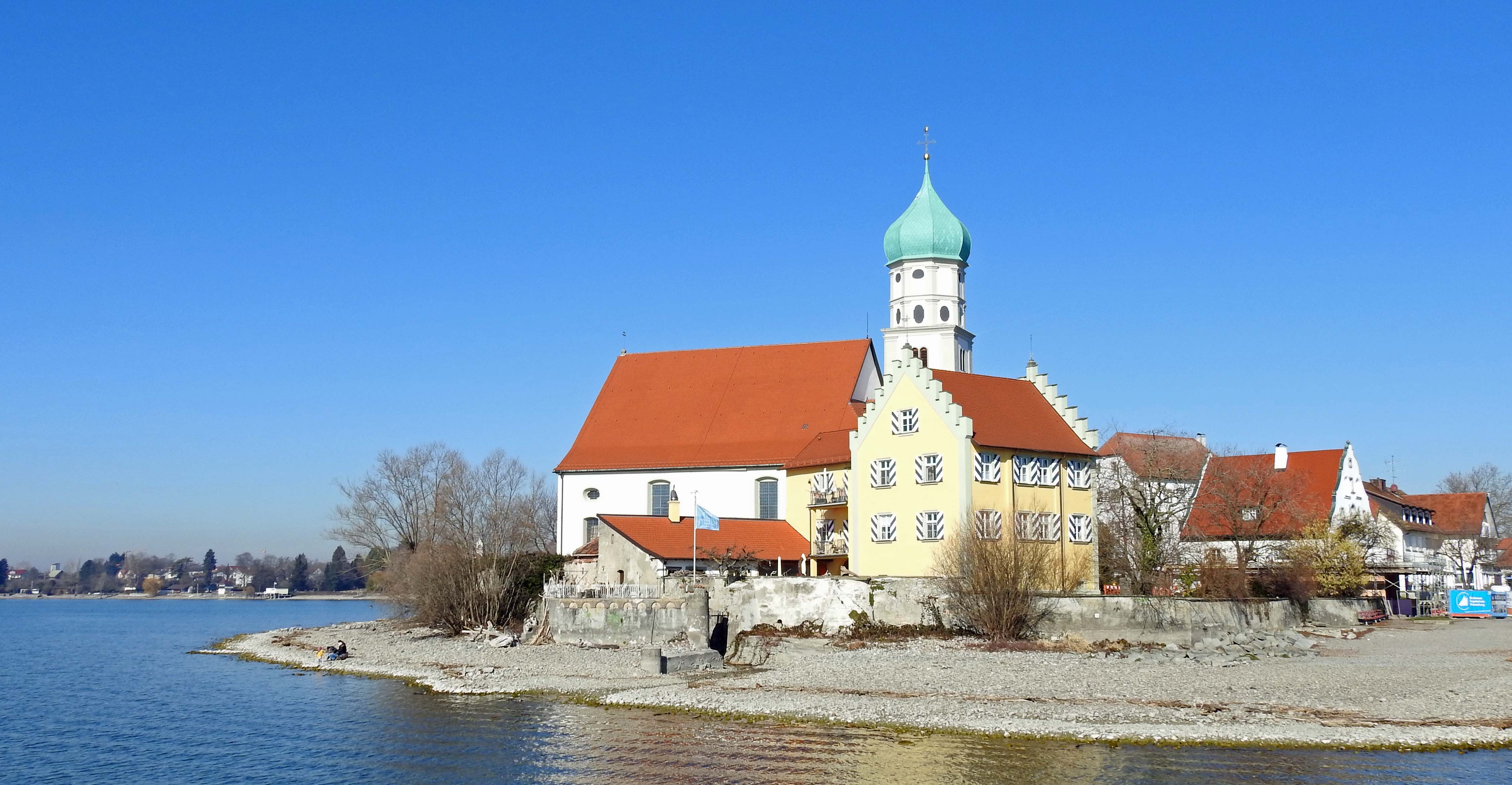 Wasserburg am Bodensee - Pfarrhof und Pfarrkirche St. Georg von Südosten